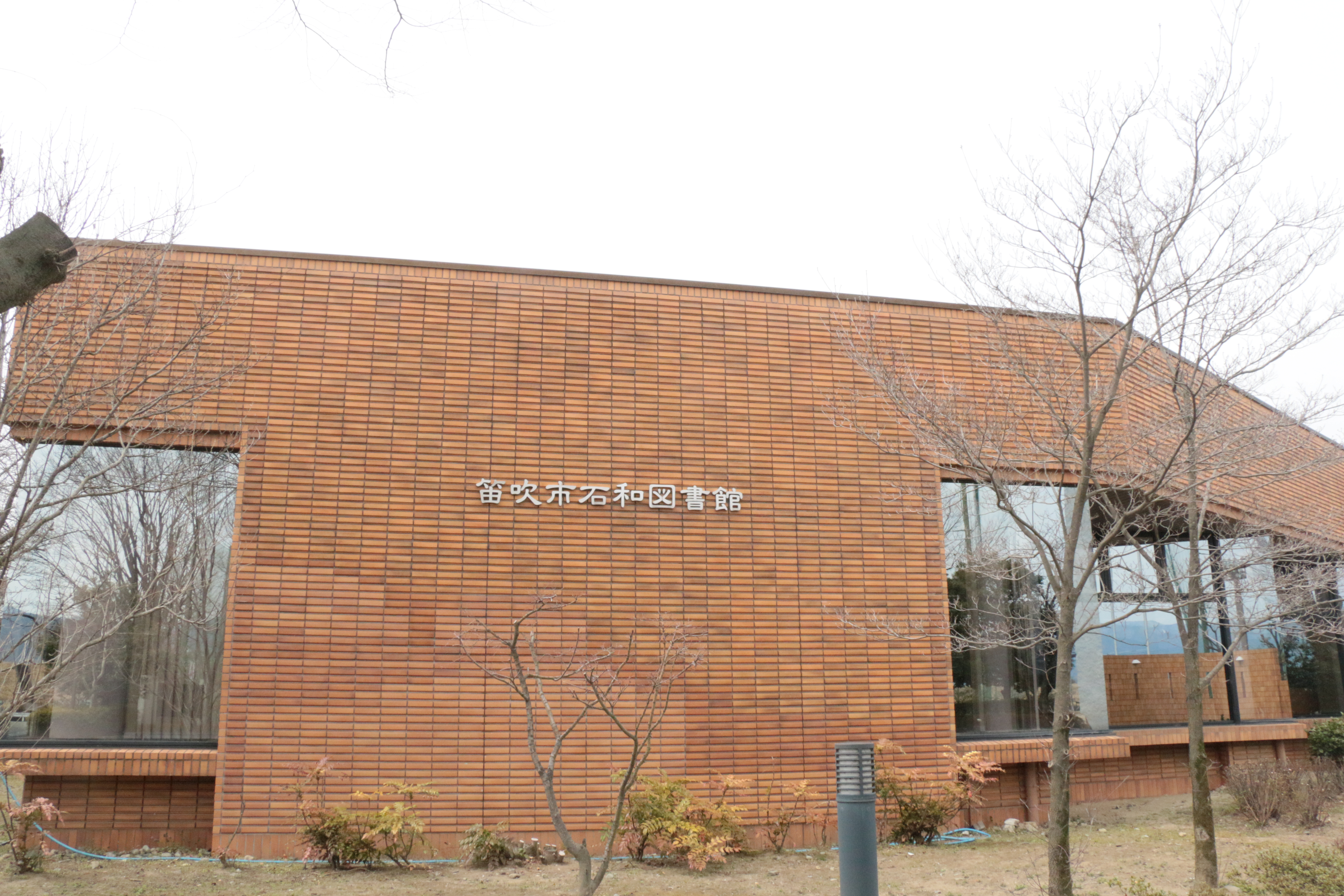 笛吹市石和図書館